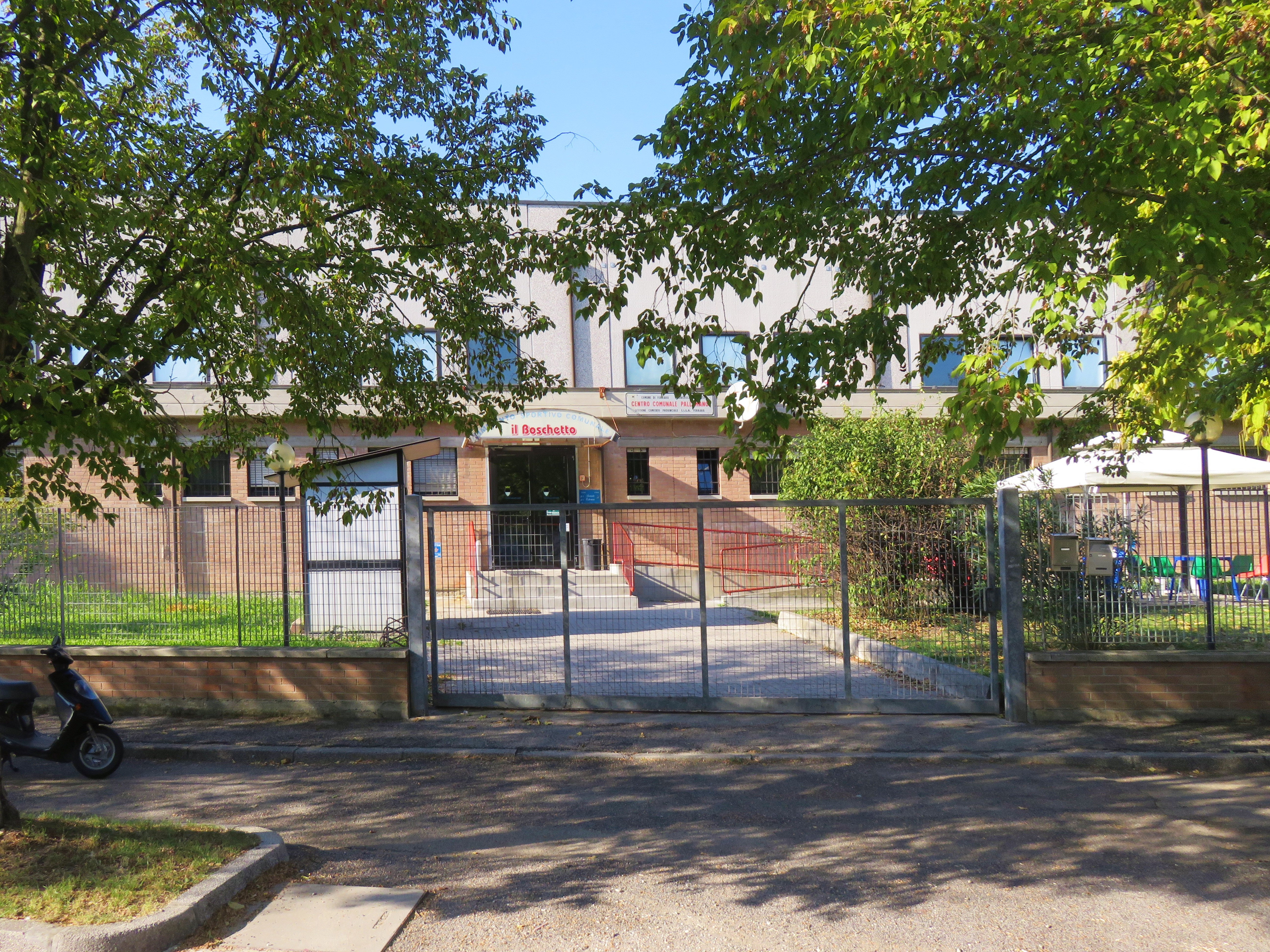 Palaboschetto, vista dalla strada